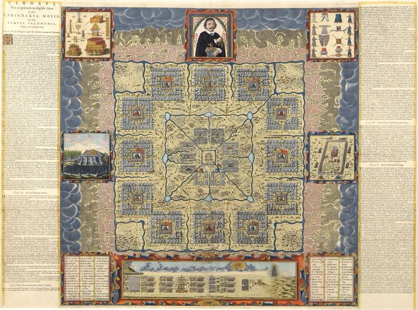 Faksilime eines kolorierten Stich des Zeltheiligtums ca 1647.